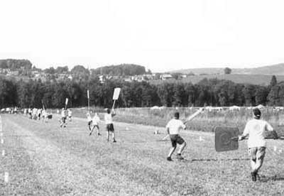 Hornussergesellschaft Zollikofen am Eidgenössischen Hornusserfest 2000 in Frauenfeld. Die Spieler mit quergestellter hochgehaltener Schindel zeigen den hinter ihnen stehenden Spielern die Flugbahn des Nouss an.